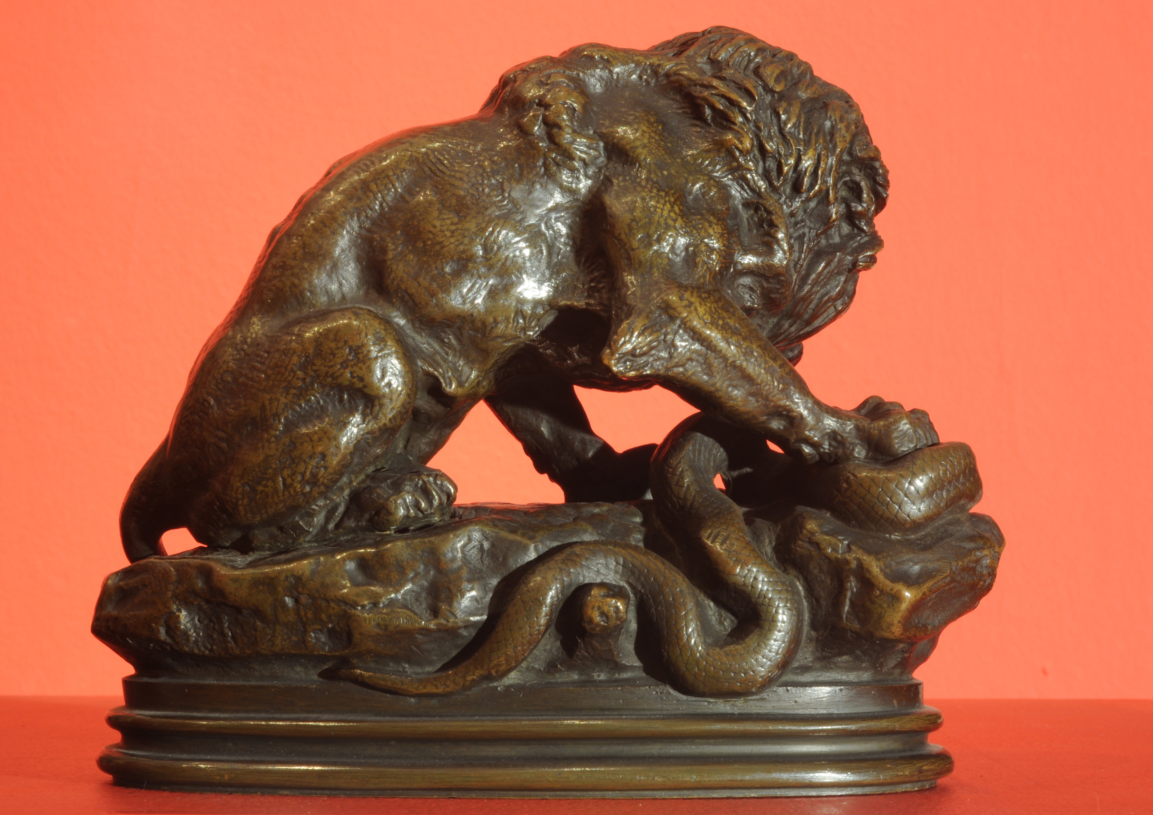 Antoine-Louis Barye, Lion et serpent (León y serpiente). Siglo XIX. 17 x 10,3 x 20 cm, modelado y vaciado de bronce. Inv. 3573.